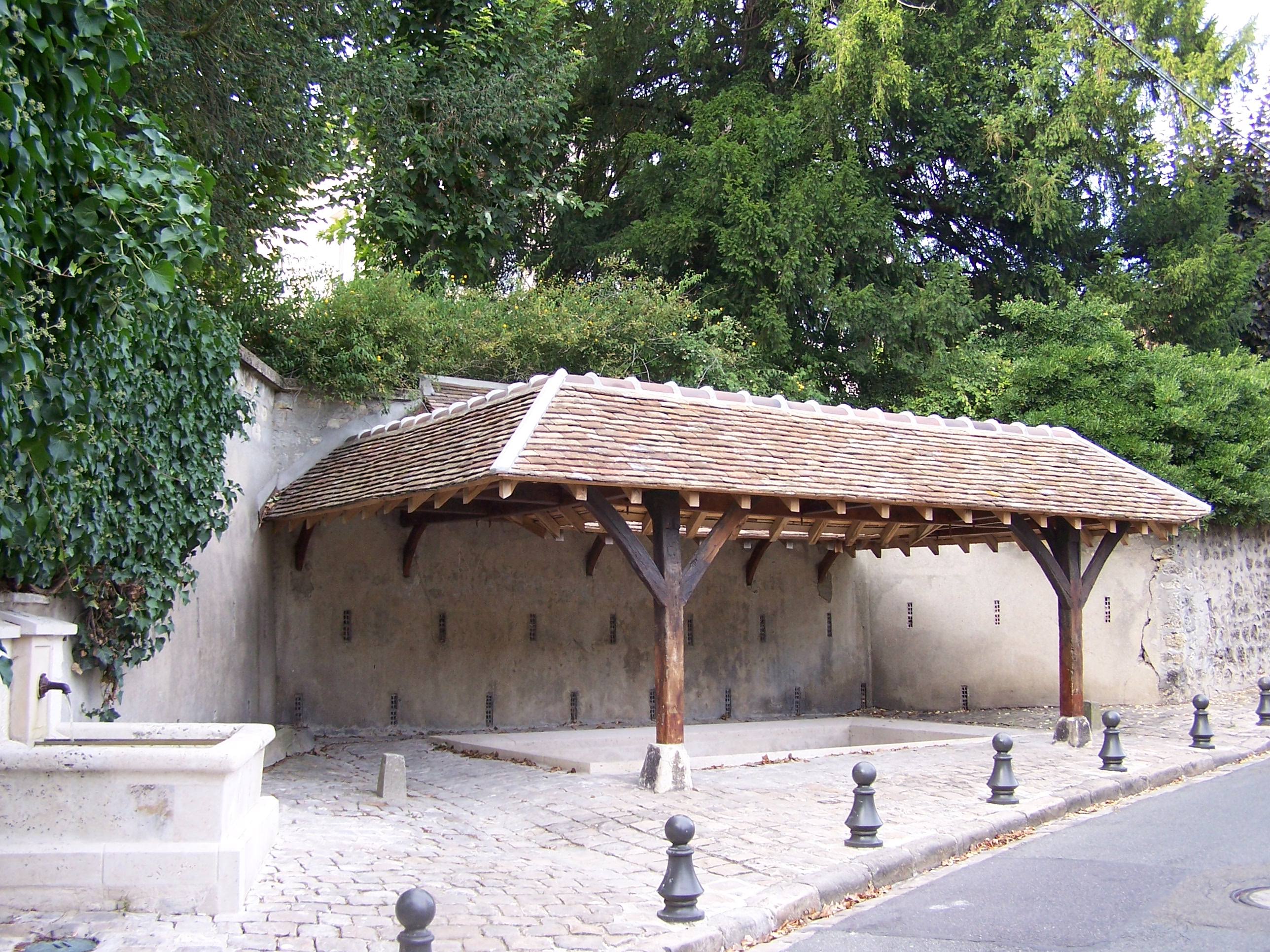 Lavoir de Bougival (Yvelines, France).